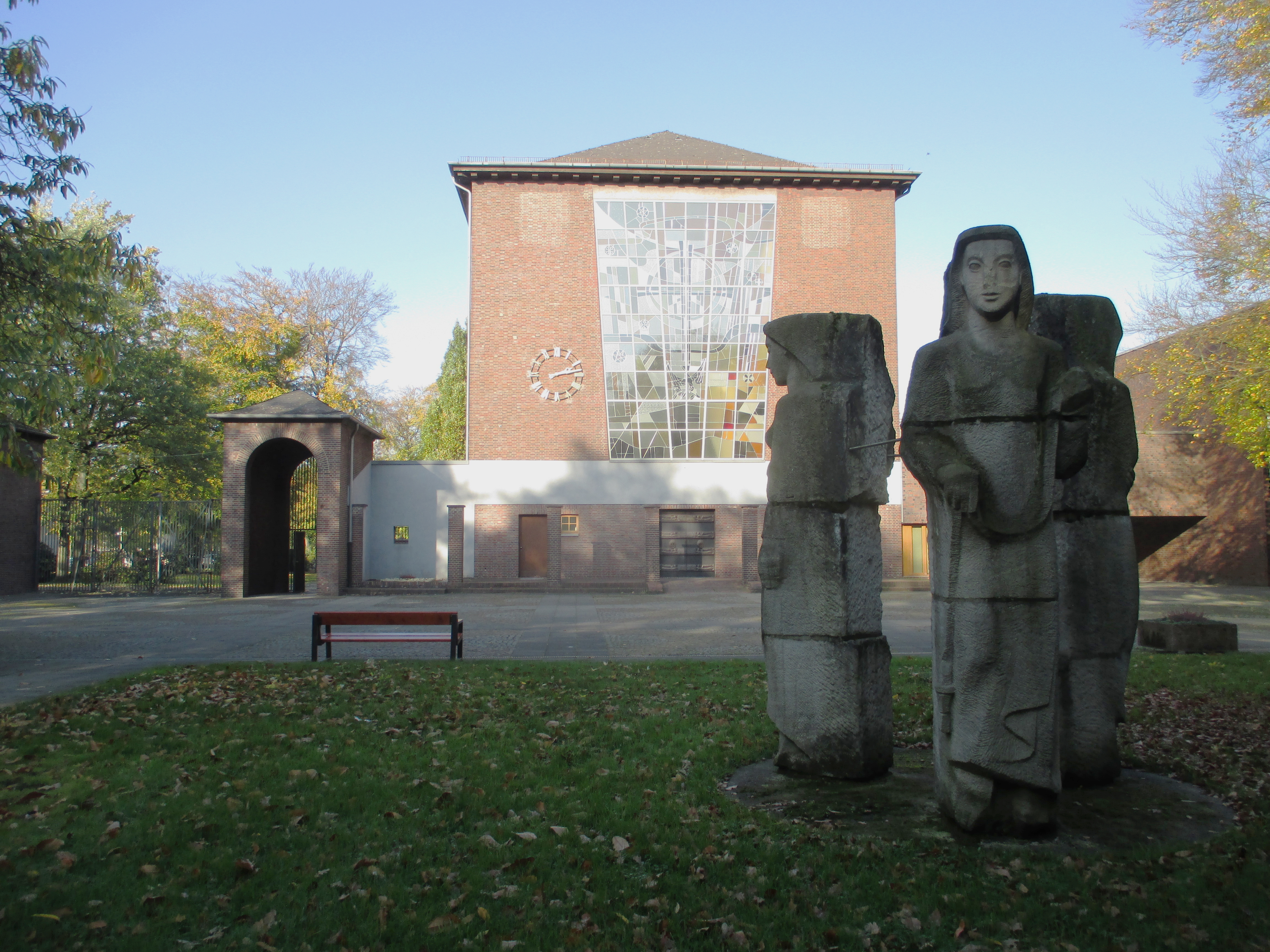 Skulpturengruppe "Die Lebensalter" ( 1947 / 1952) von Kurt Schwippert vor Trauerhalle des Waldfriedhofs.